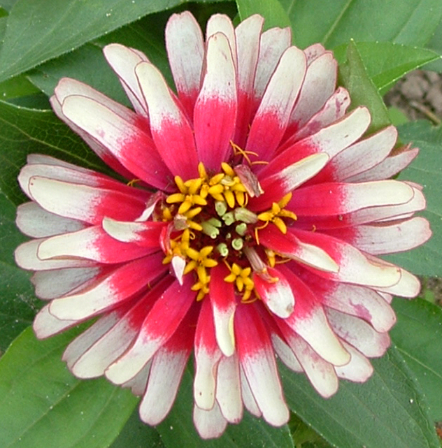 Zinnia violacea (= Z. elegans)